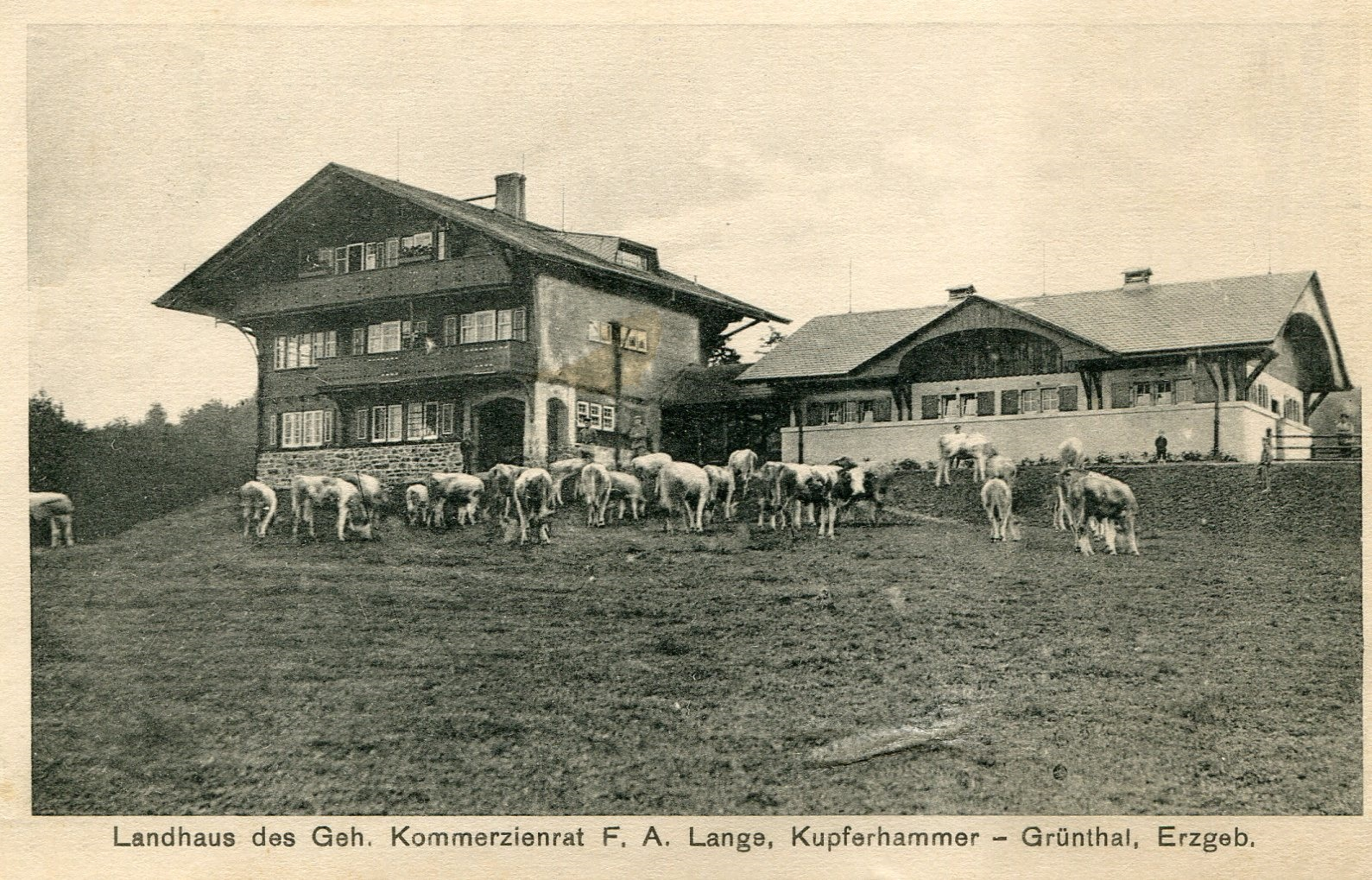 Landhaus des Geh. Kommerzienrat F. A. Lange, Kupferhammer - Grünthal, Erzgeb.